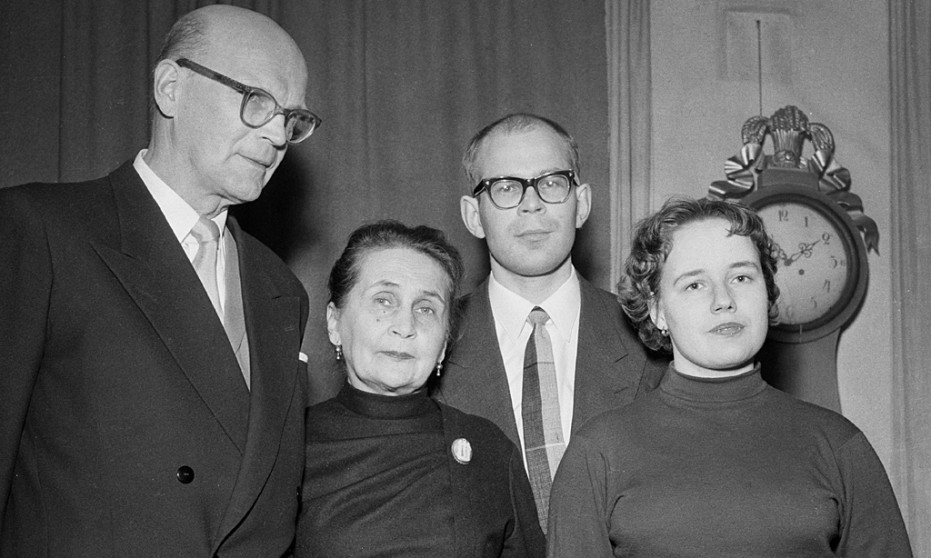 Tasavallan presidentiksi juuri valittu Urho Kekkonen puolisonsa Sylvin sekä poikansa Matin ja tämän vaimon Marjan (os. Linnala) kanssa Tamminiemessä 15. helmikuuta 1956.